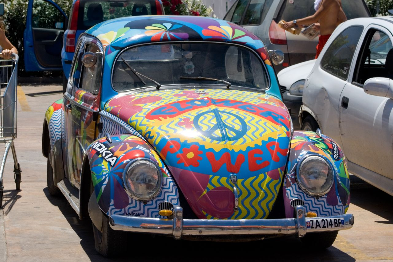 Hippie beetle!